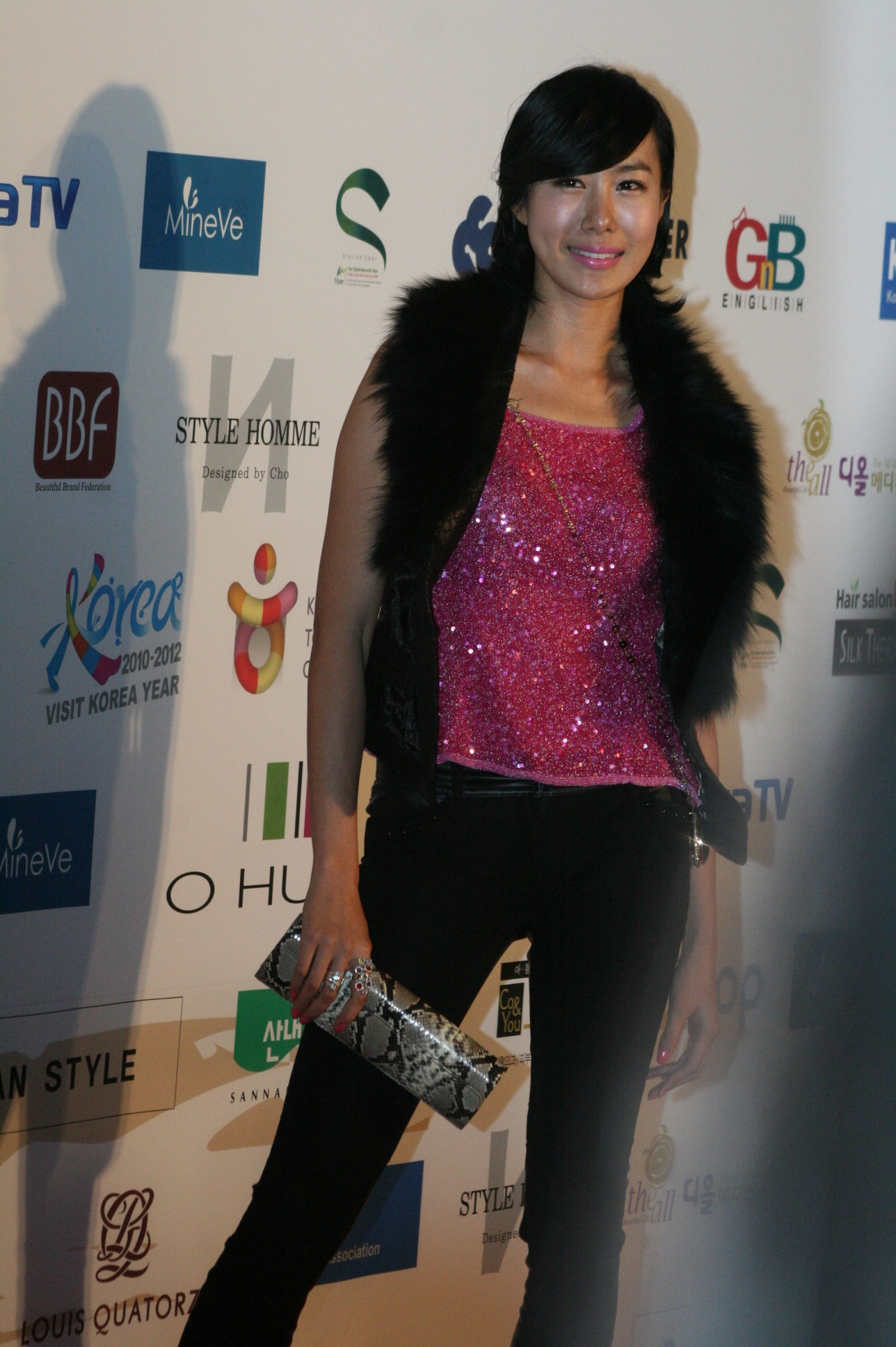 2009 아시아모델상 시상식